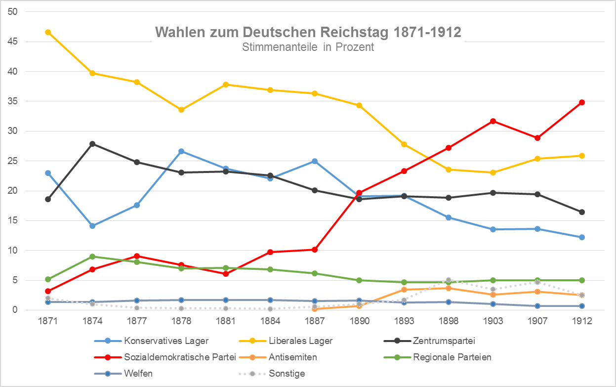 Wahlen zum Deutschen Reichstag 1971-1912 / Übersicht Lager / Prozent